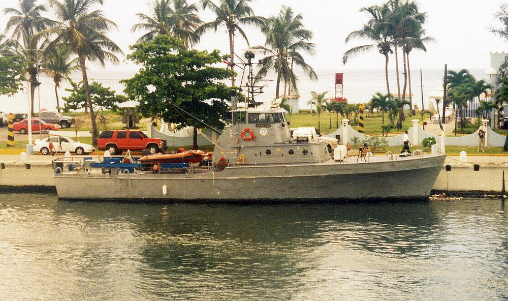 Guardacostas GC-105 Antares